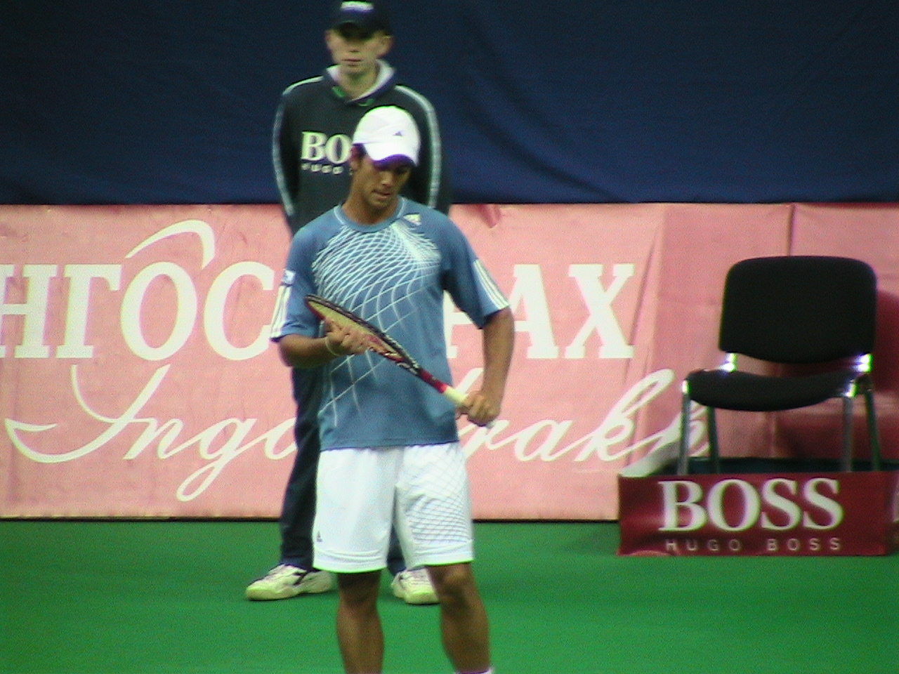 Fernando Verdasco at 2006 Kremlin Cup in Moscow